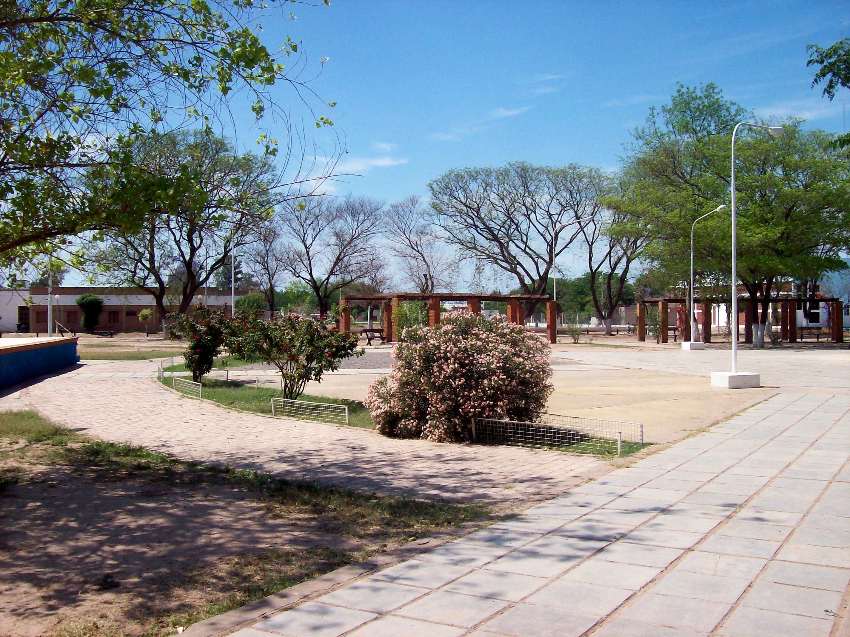 Plaza principal de Taco Pozo, en Departamento de Almirante Brown, Provincia del Chaco, República Argentina.